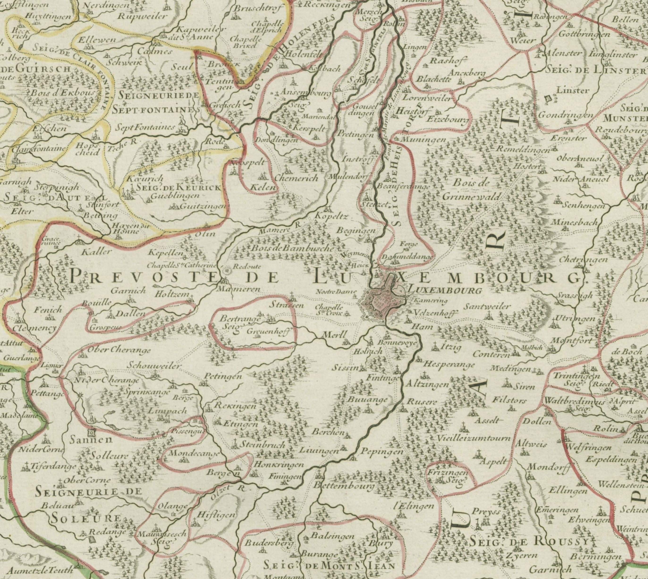 La prévôté de Luxembourg sur une carte de 1705 : Le Duché de Luxembourg divisé en Quartier Walon et Allemand dans chacun desquels sont diviséz, les Seigneuries, Prevostés et Comtés. Le Duché de Bouillon, le Comté de Namur et le Pays entre Sambre et Meuse.